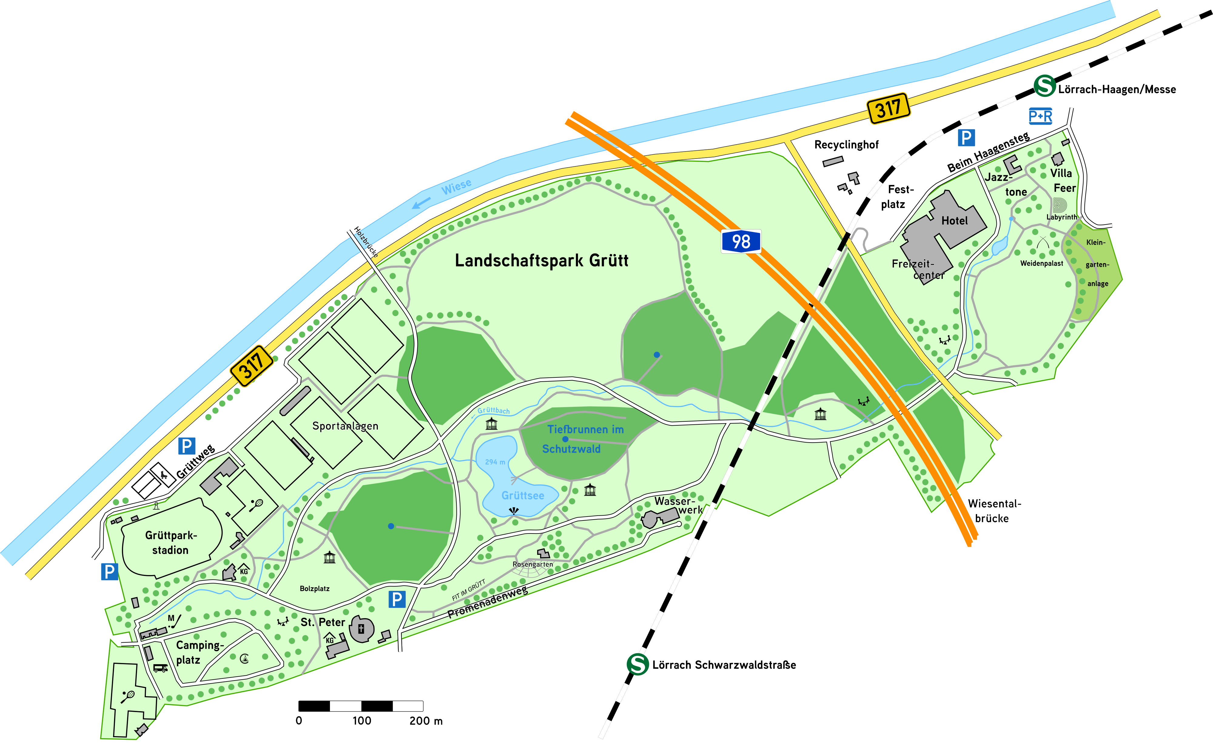 Karte des Landschaftsparks Grütt in Lörrach